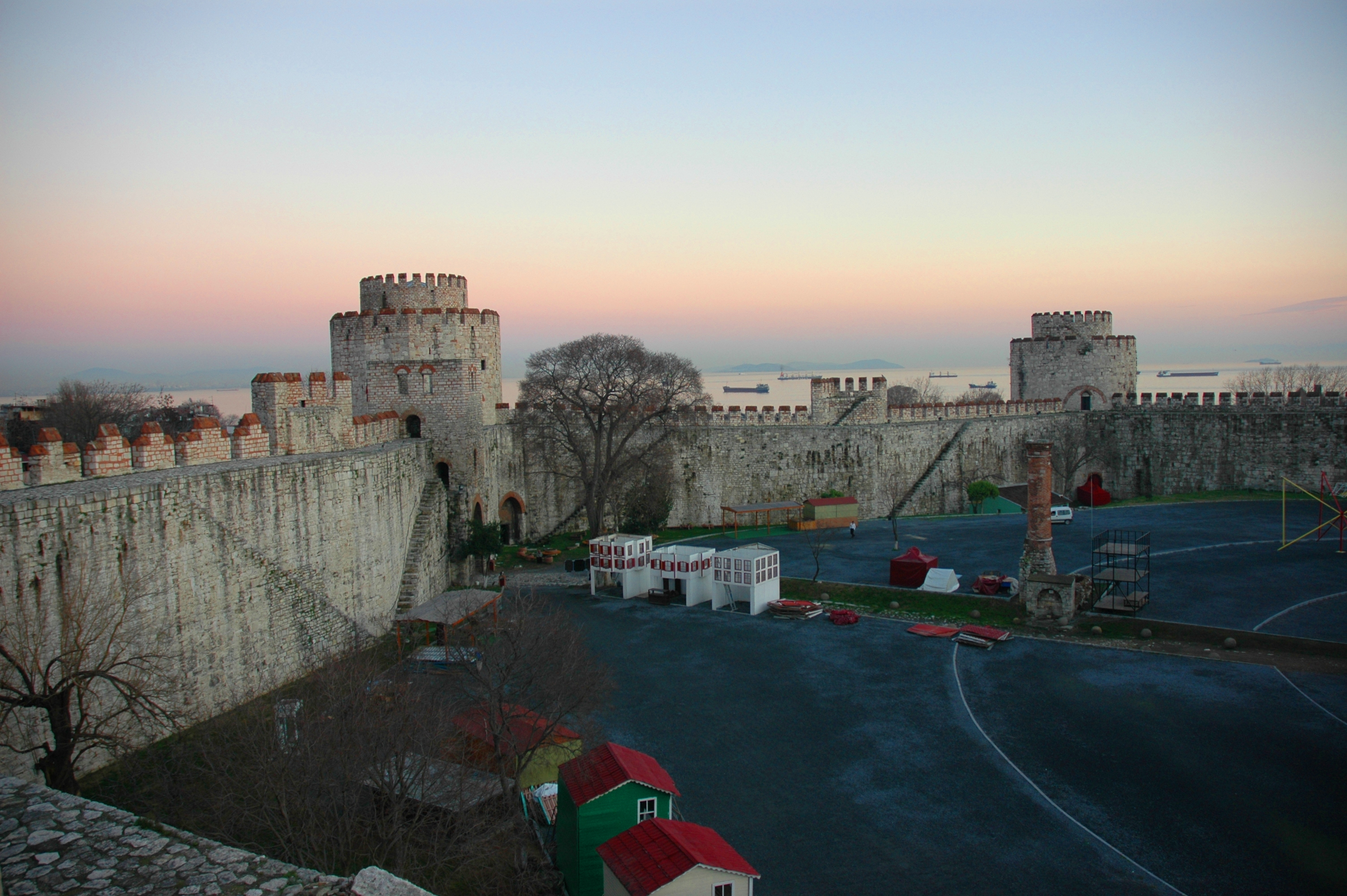 Istanbul - Castell de Yedikule